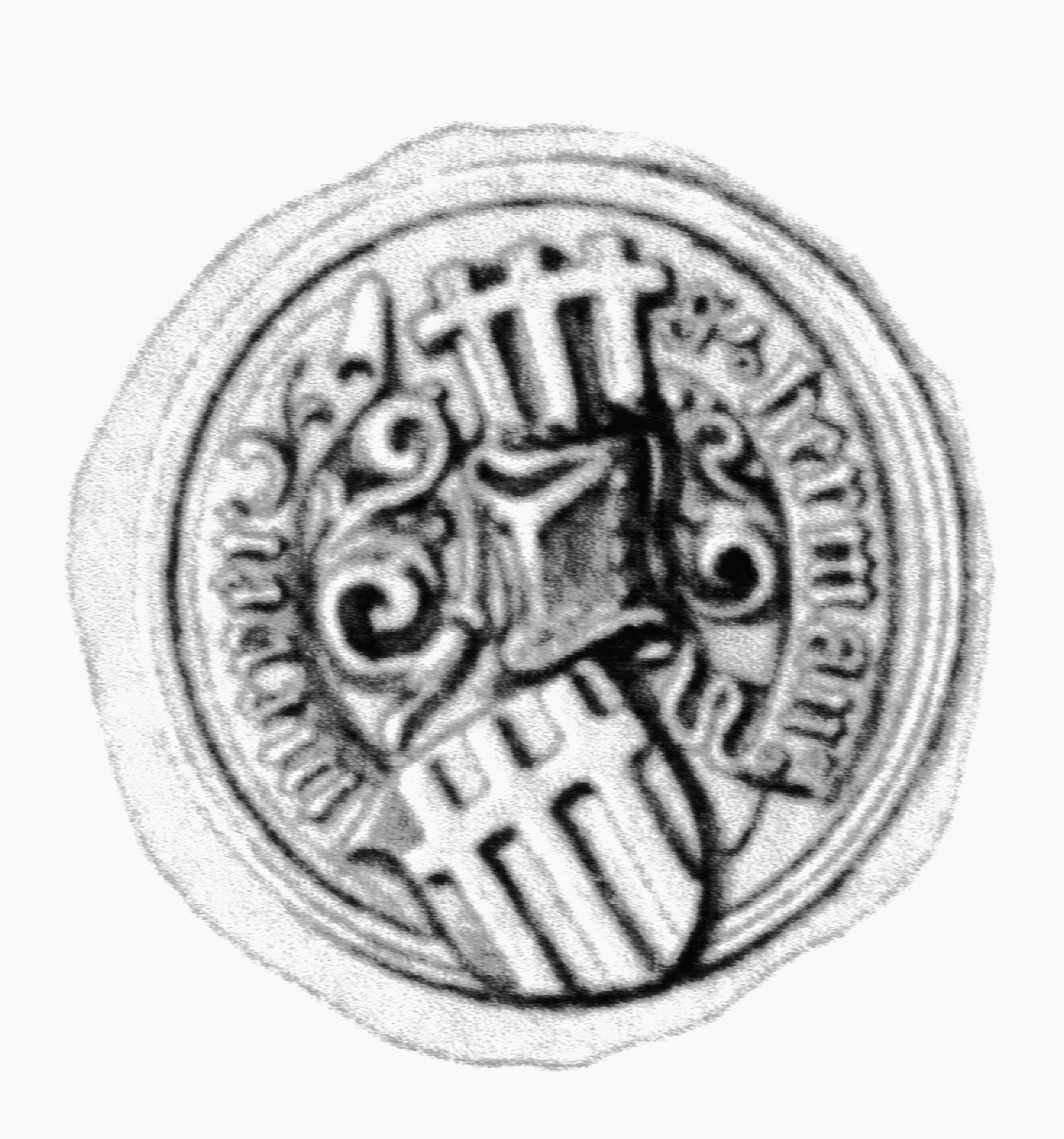 Siegel des Ratsmannes Herman(n) Meyer. Das Siegel stammt aus der Zeit um 1510. Siehe Emil Ferdinand Fehling: Lübeckische Ratslinie, Nr. 584 (Hermann Meyer, BM).